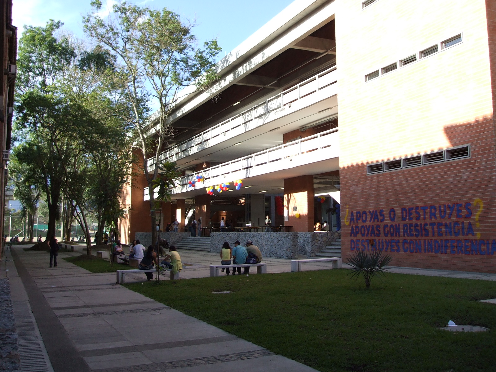 Bloque 19 de la Universidad de Antioquia. Medelln.Colombia